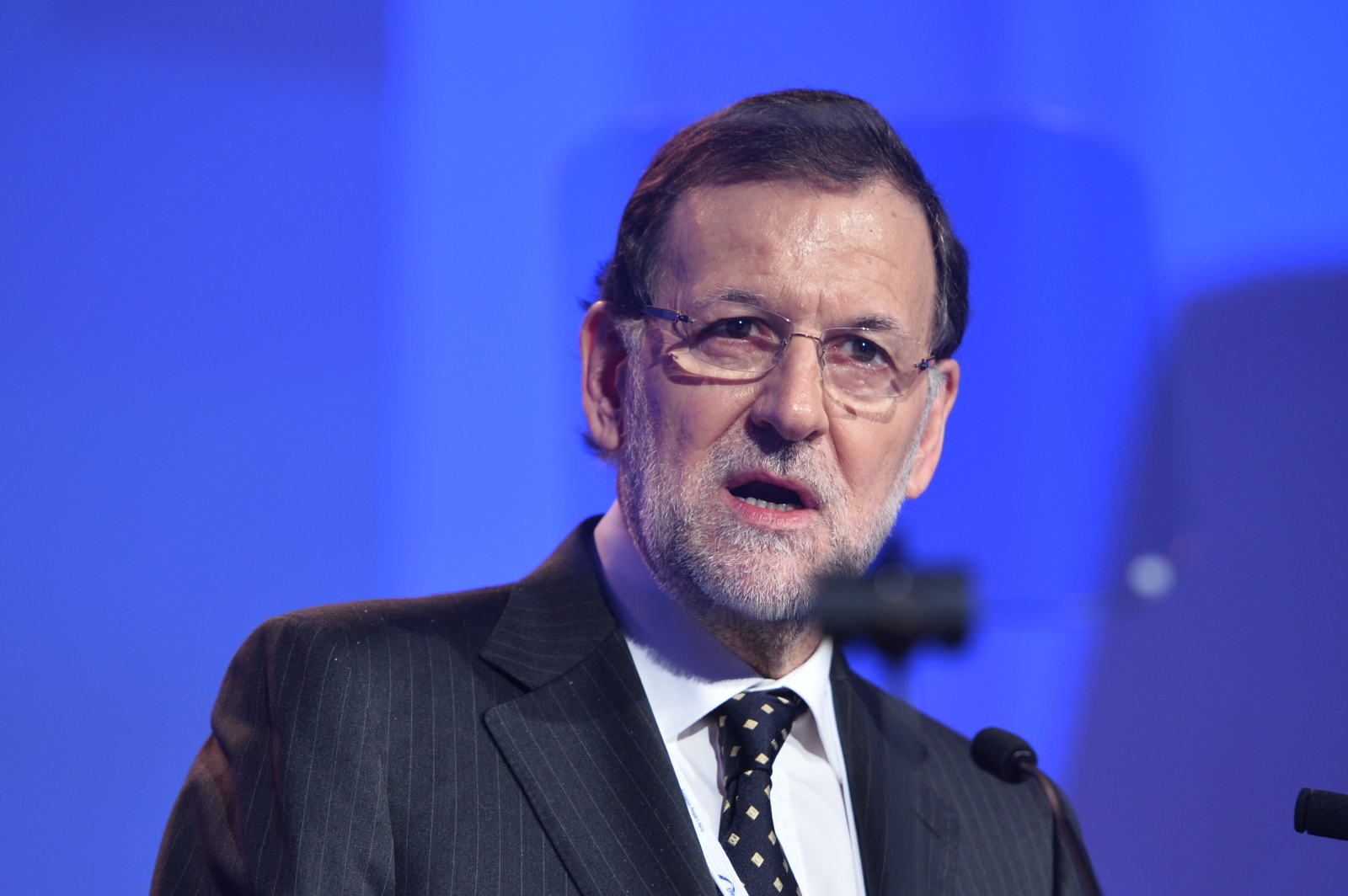 Mariano Rajoy